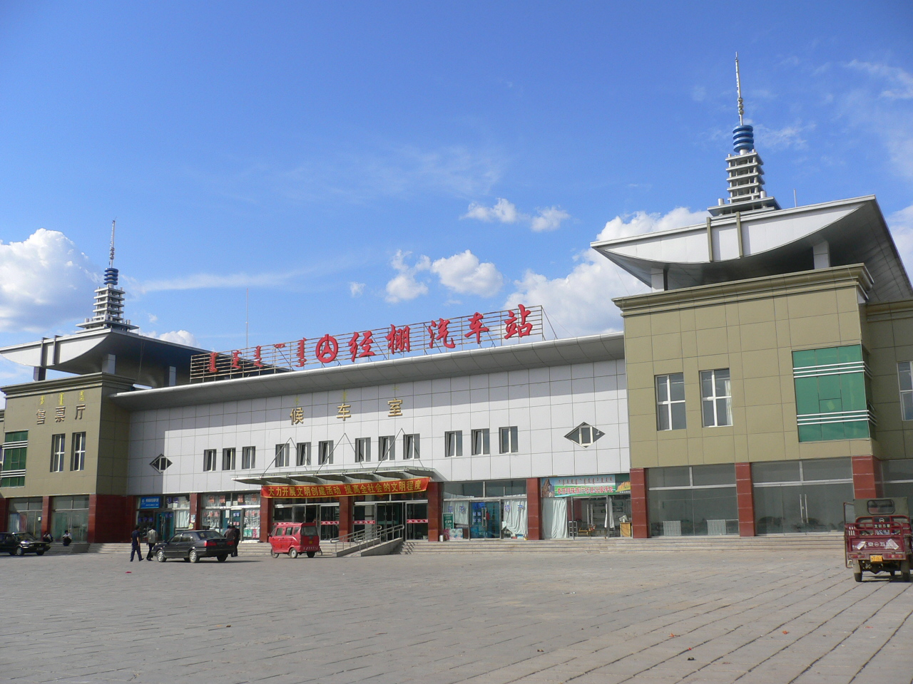 克什克腾旗车站